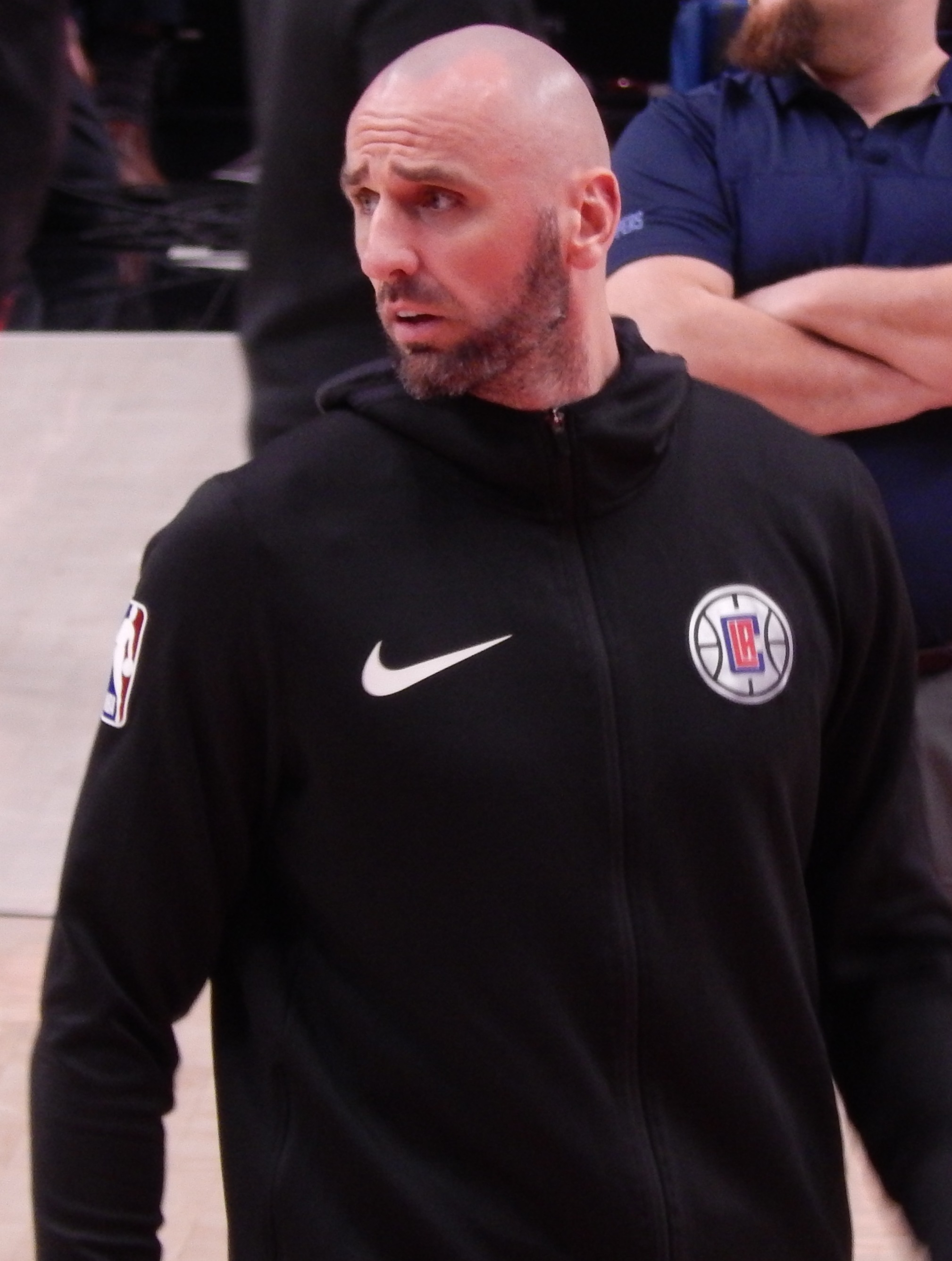 Marcin Gortat #13 of the Los Angeles Clippers against the Portland Trail Blazers on November 8, 2018 at Moda Center in Portland, Oregon.